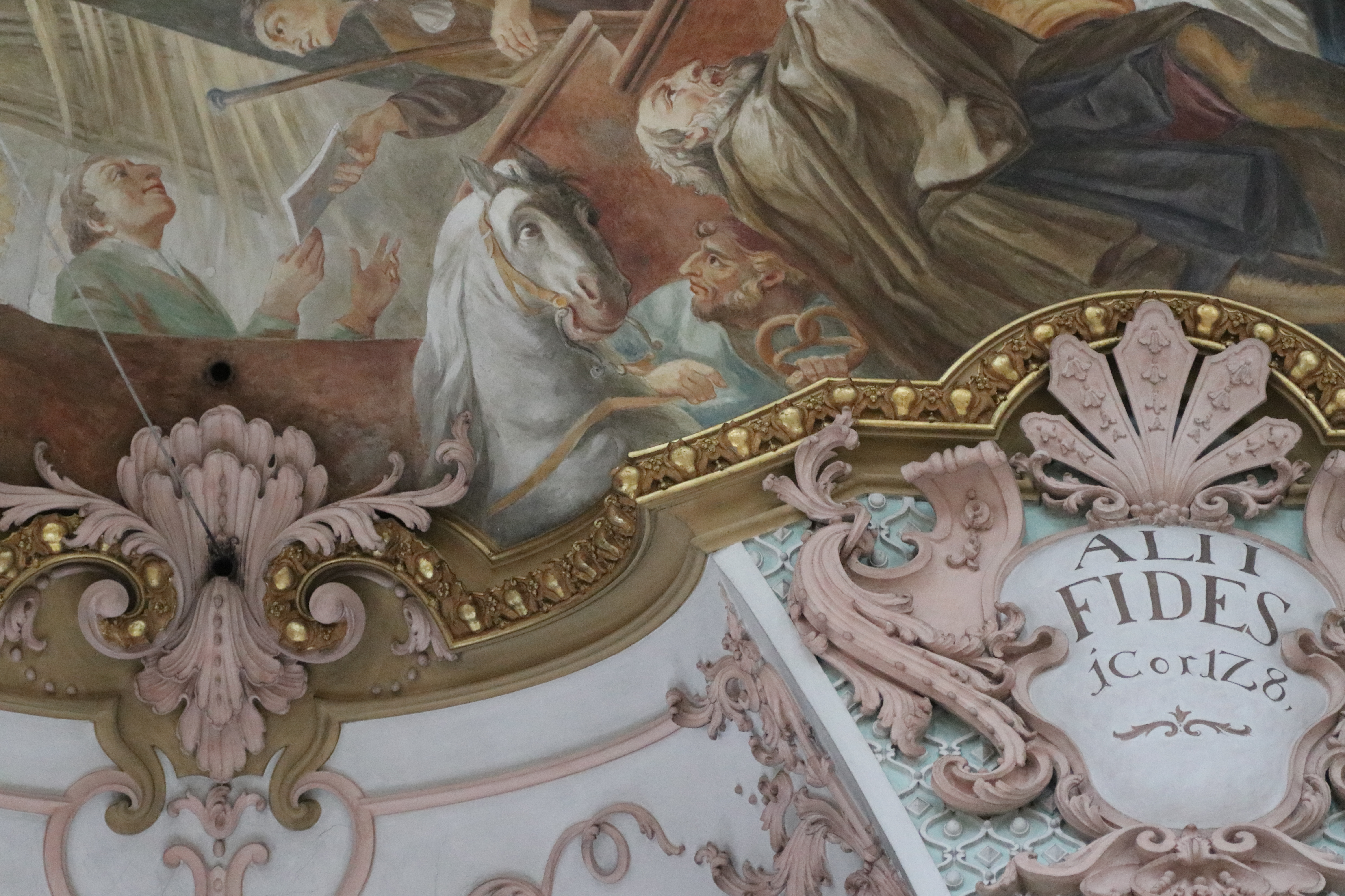 Heilig Geist Kirche München, die erste Kirche außerhalb der Münchner Stadtmauern. Detail des Brenzenreiters aus dem Deckenfresko der Gebrüder Asam